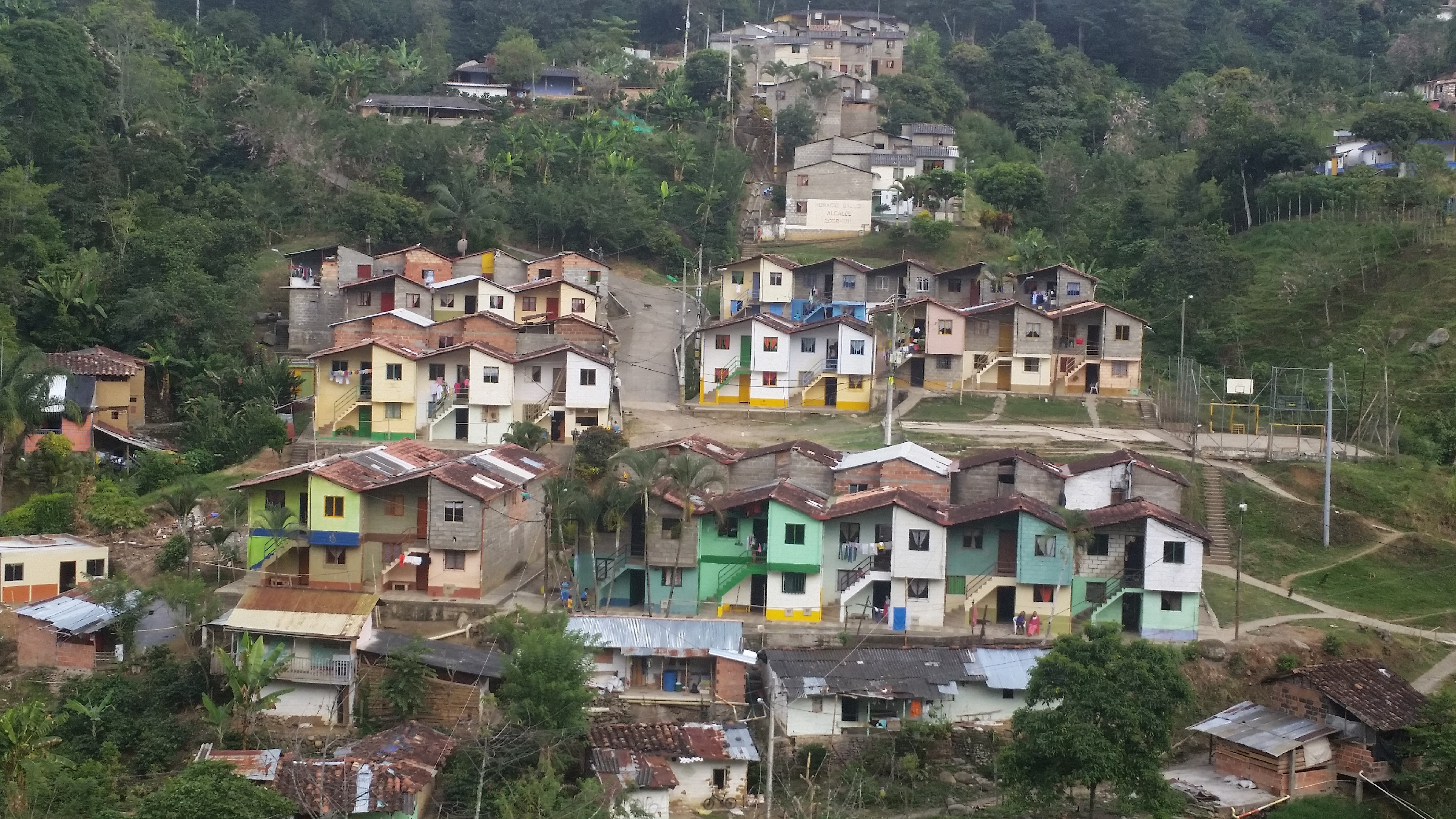 Barrio Brisas del San Juan - Andes Antioquia 1